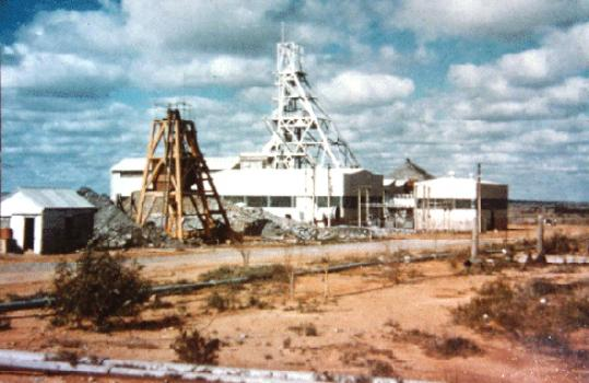 Radium Hill minesite